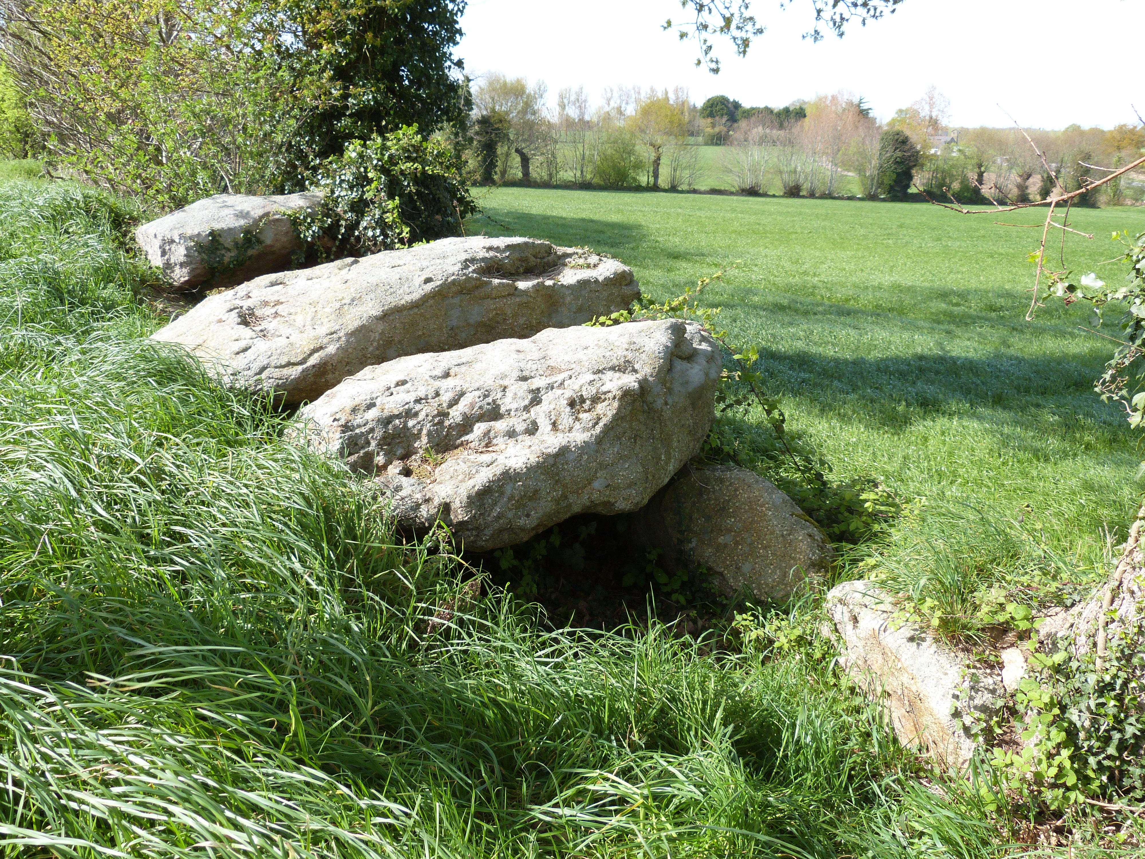 Allée couverte de l'Epine (Le Gouray, Côtes-d'Armor)